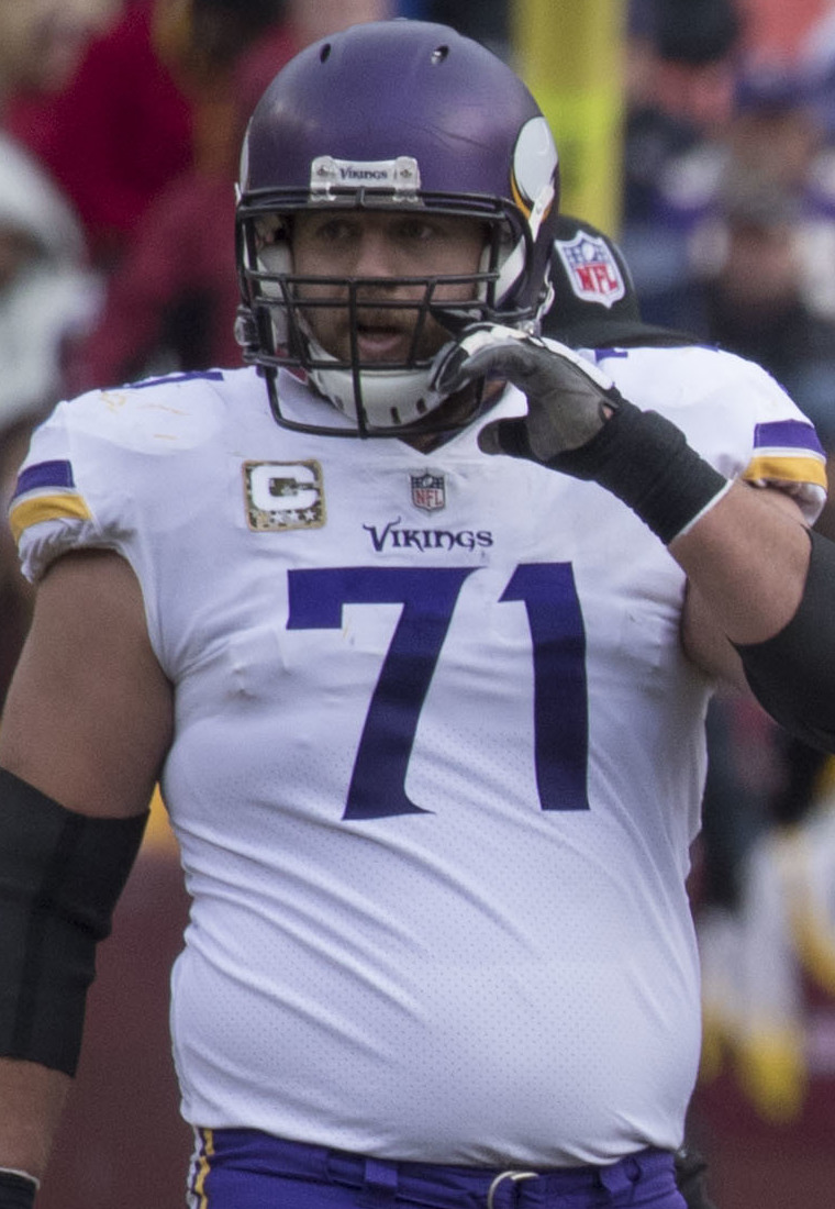 Vikings at Redskins 11/12/17